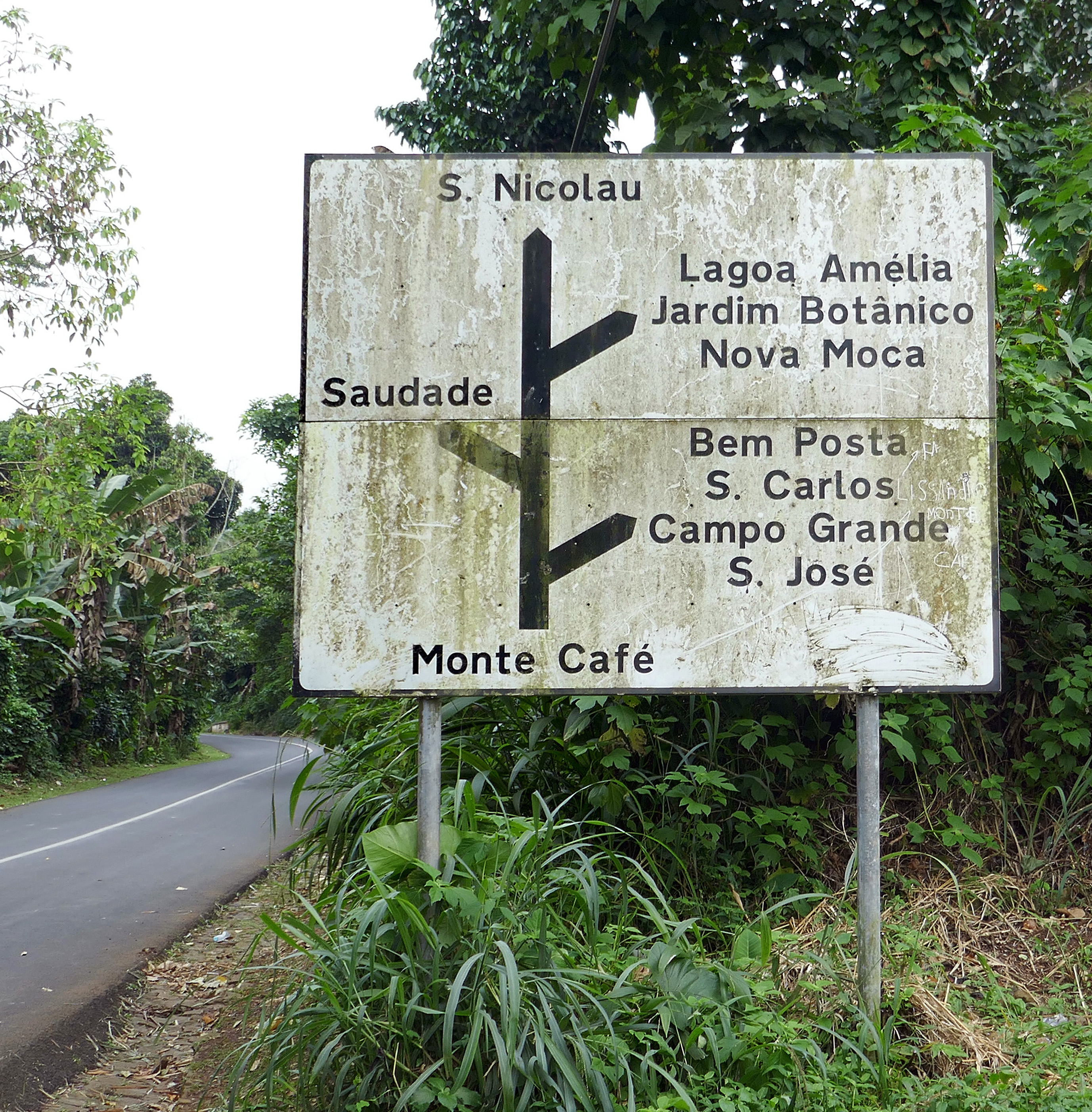 Panneau de signalisation à Monte Café, au nord de l'île de São Tomé, dans le district de Mé-Zóchi (São Tomé-et-Principe).